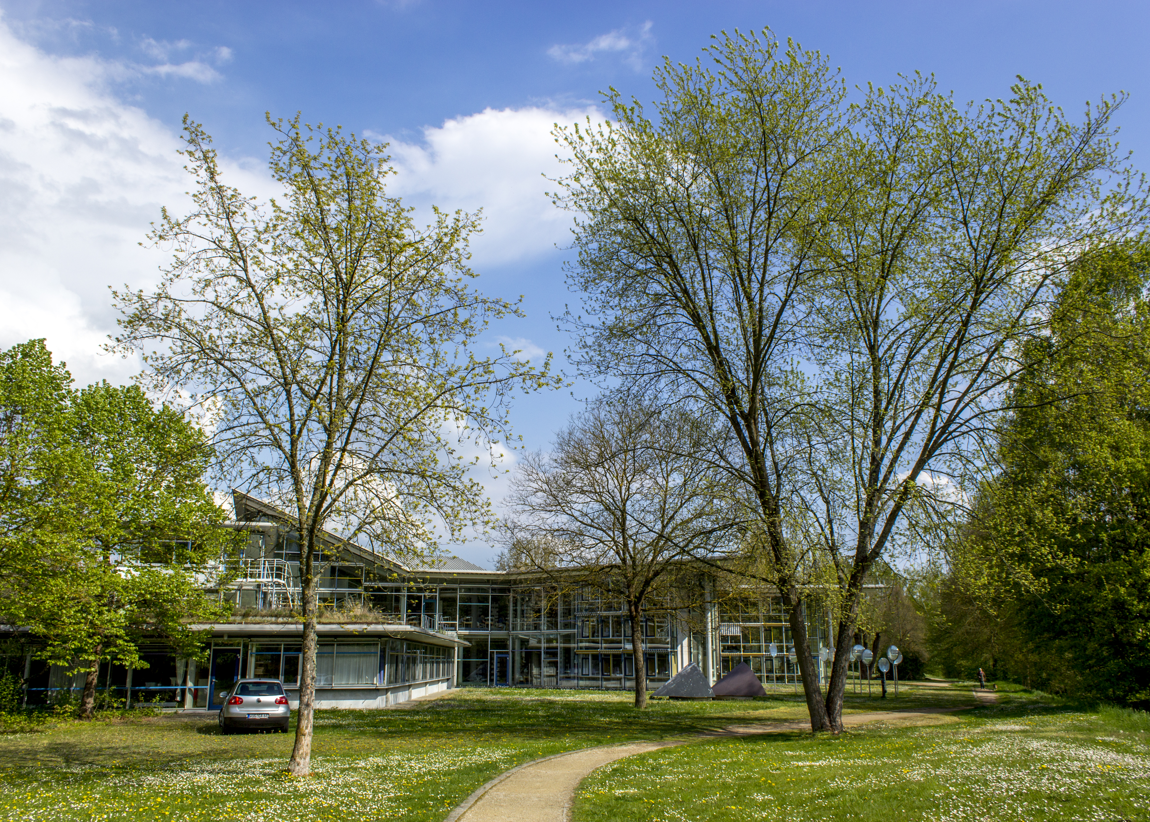 Biblioteca Central de la Universidad Católica de Eichstätt-Ingolstadt